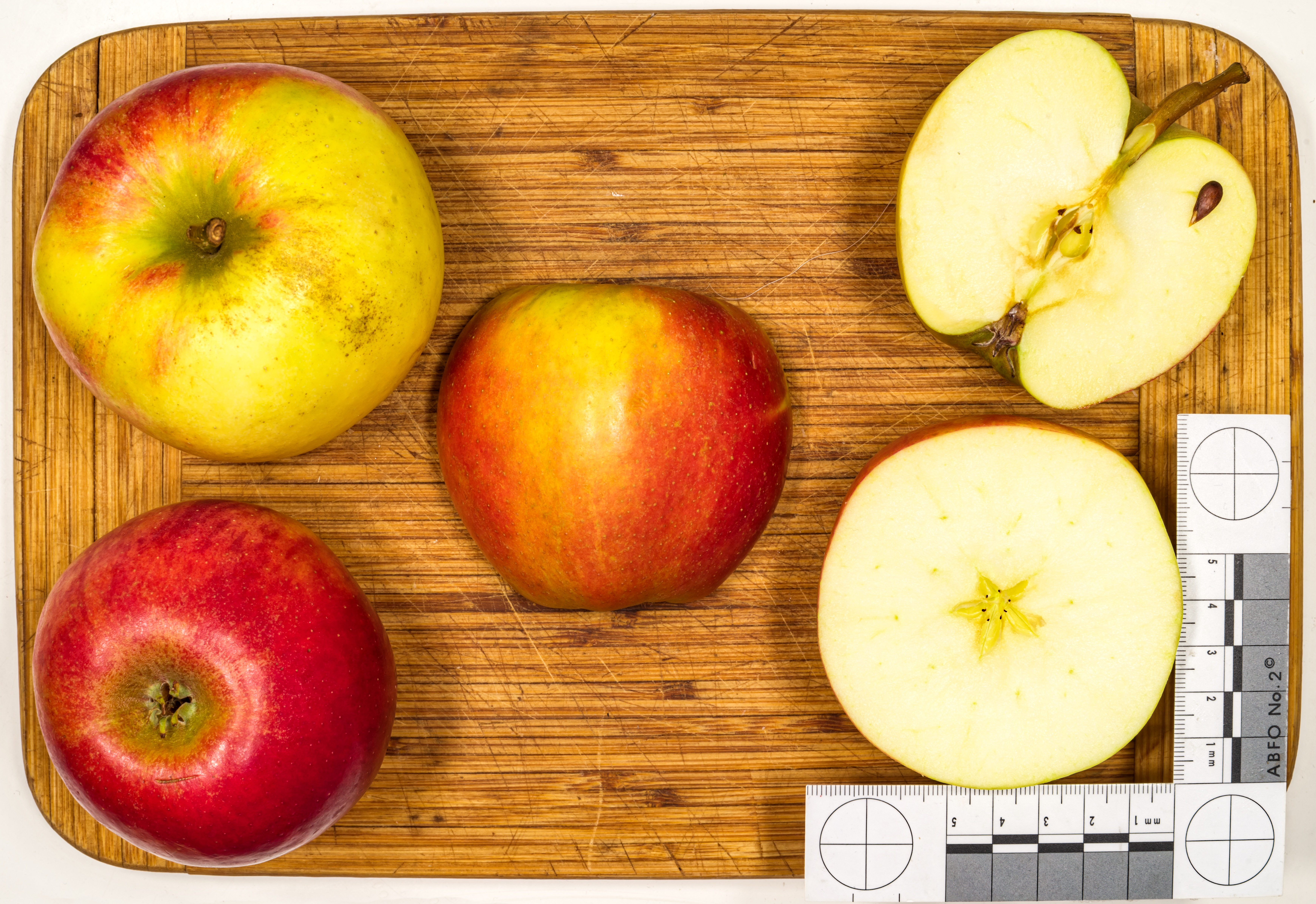 Apfelsorte: Elstar, Niederlande, 1950, sehr mutationsfreudig